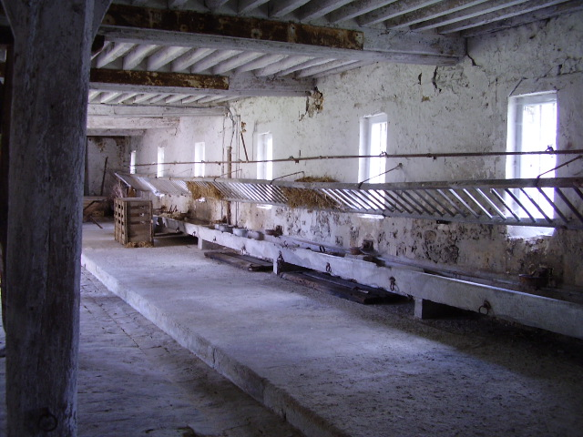 Ecuries de Port-Royal-des-Champs